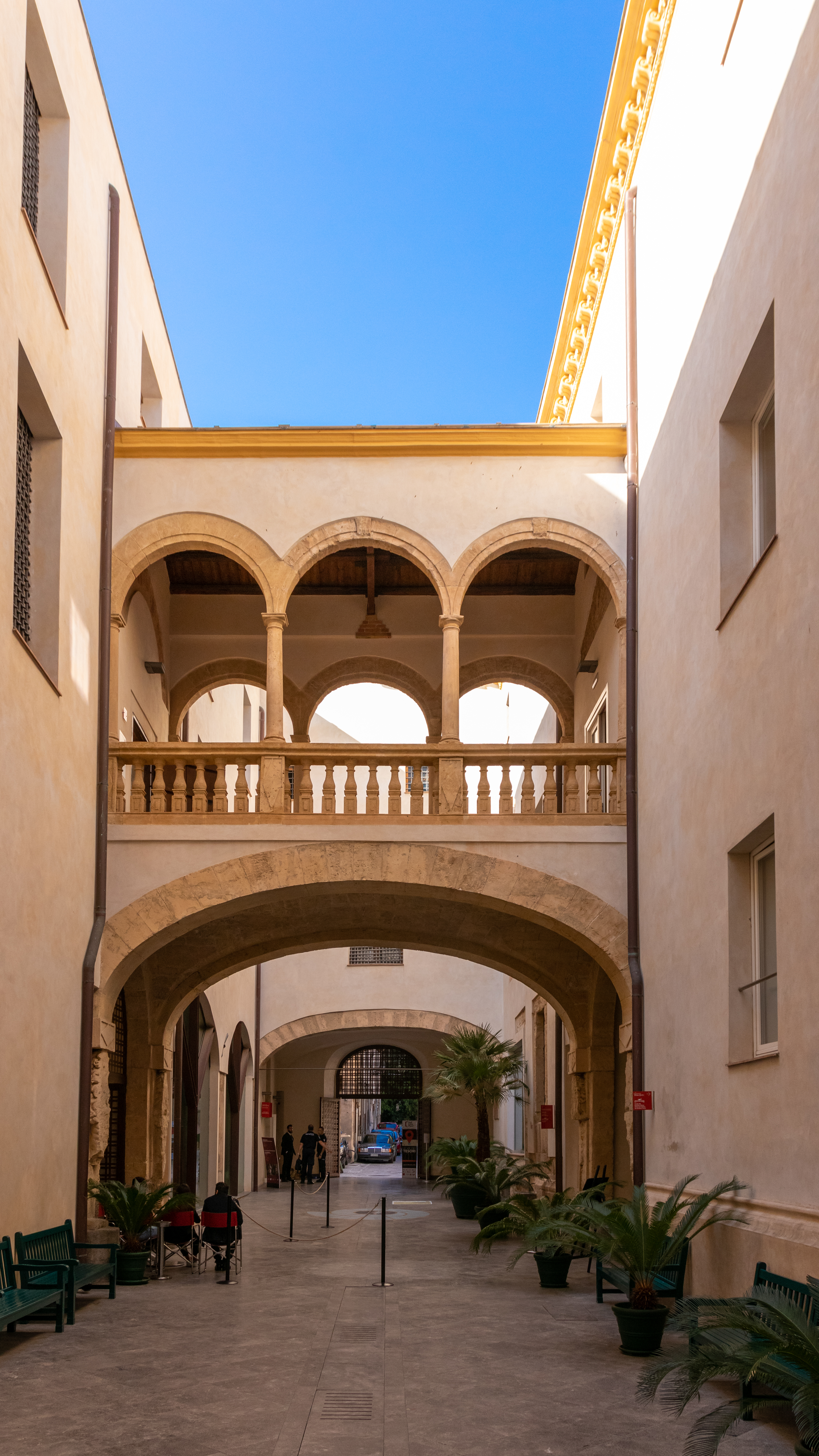 Palazzo Branciforte Palermo